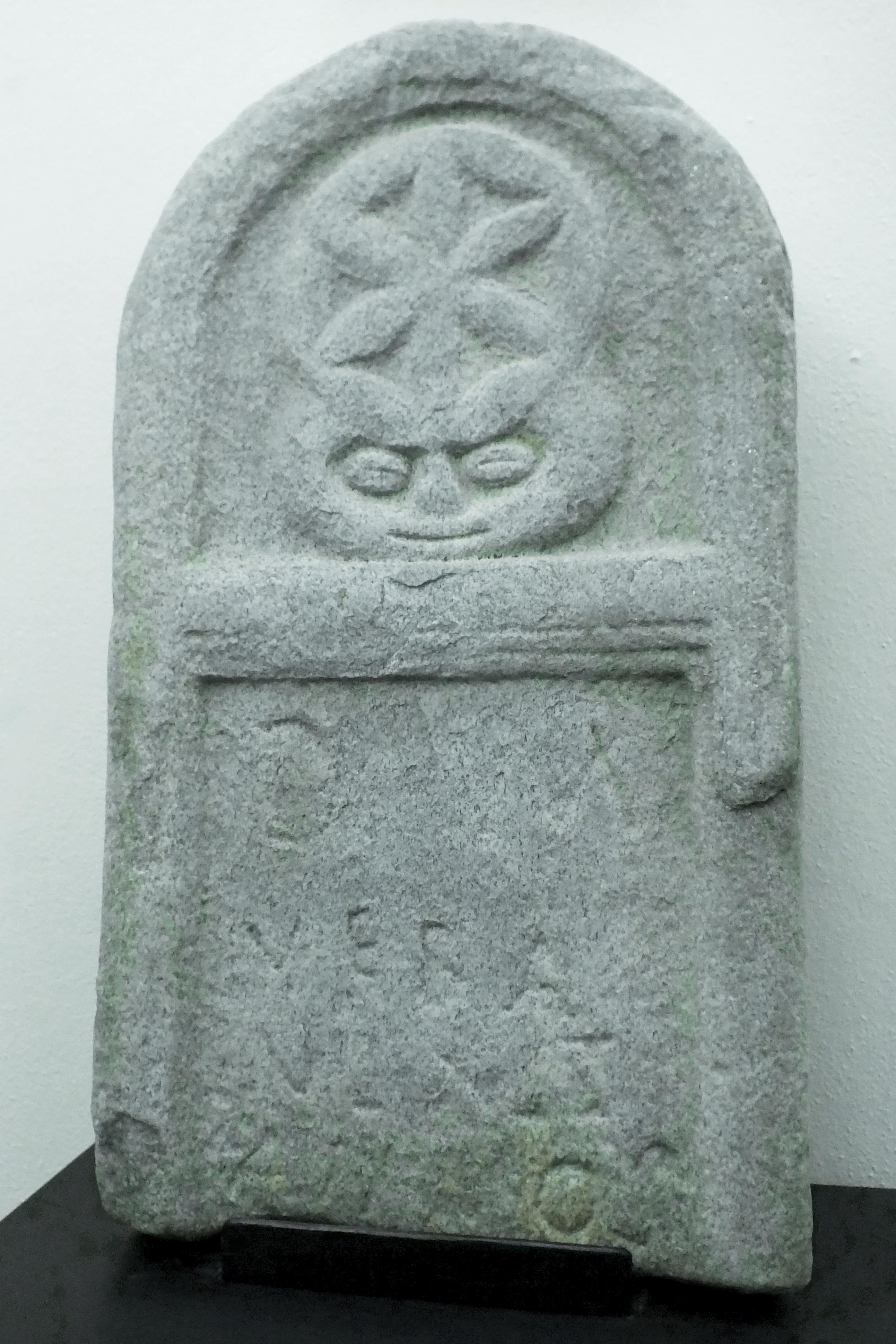 Frammento Lapide di Vera conservata al Museo Archeologico di Villa Mirabello (VA)